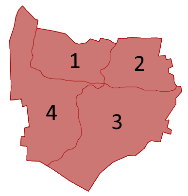 Disegno stilizzato del centro storico di Calangianus.